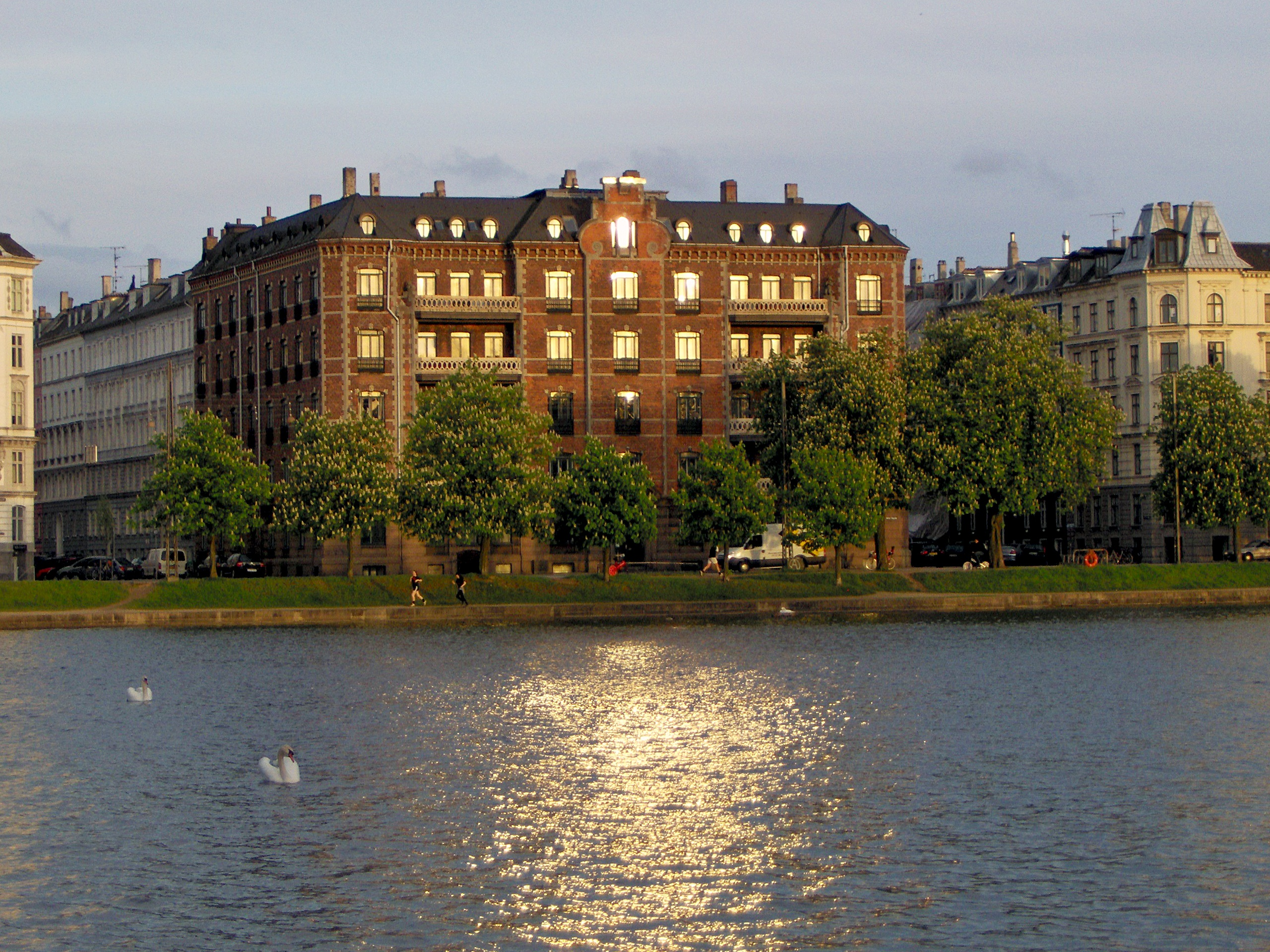 Rørholm at Søgade 32 in Copenhagen, Denmark